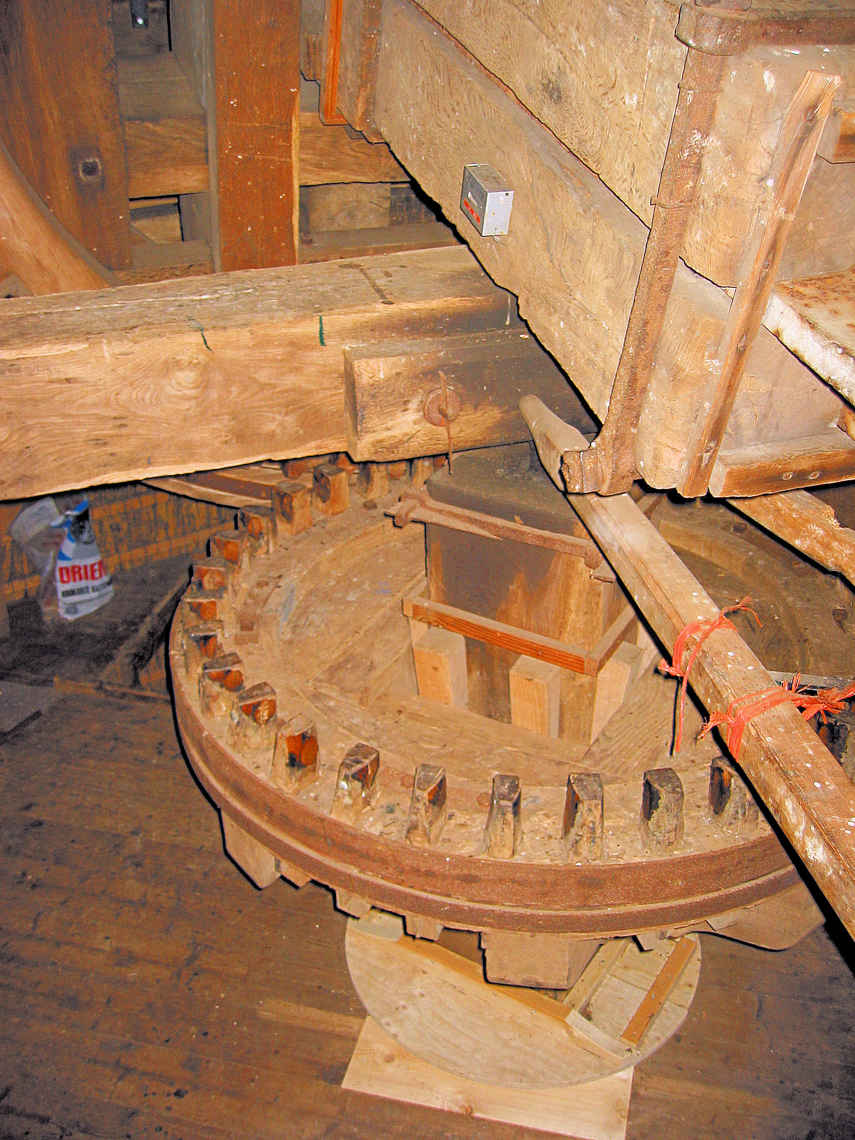 Molen het Hert, bonkelaar, Putten, Gelderland, the Netherlands